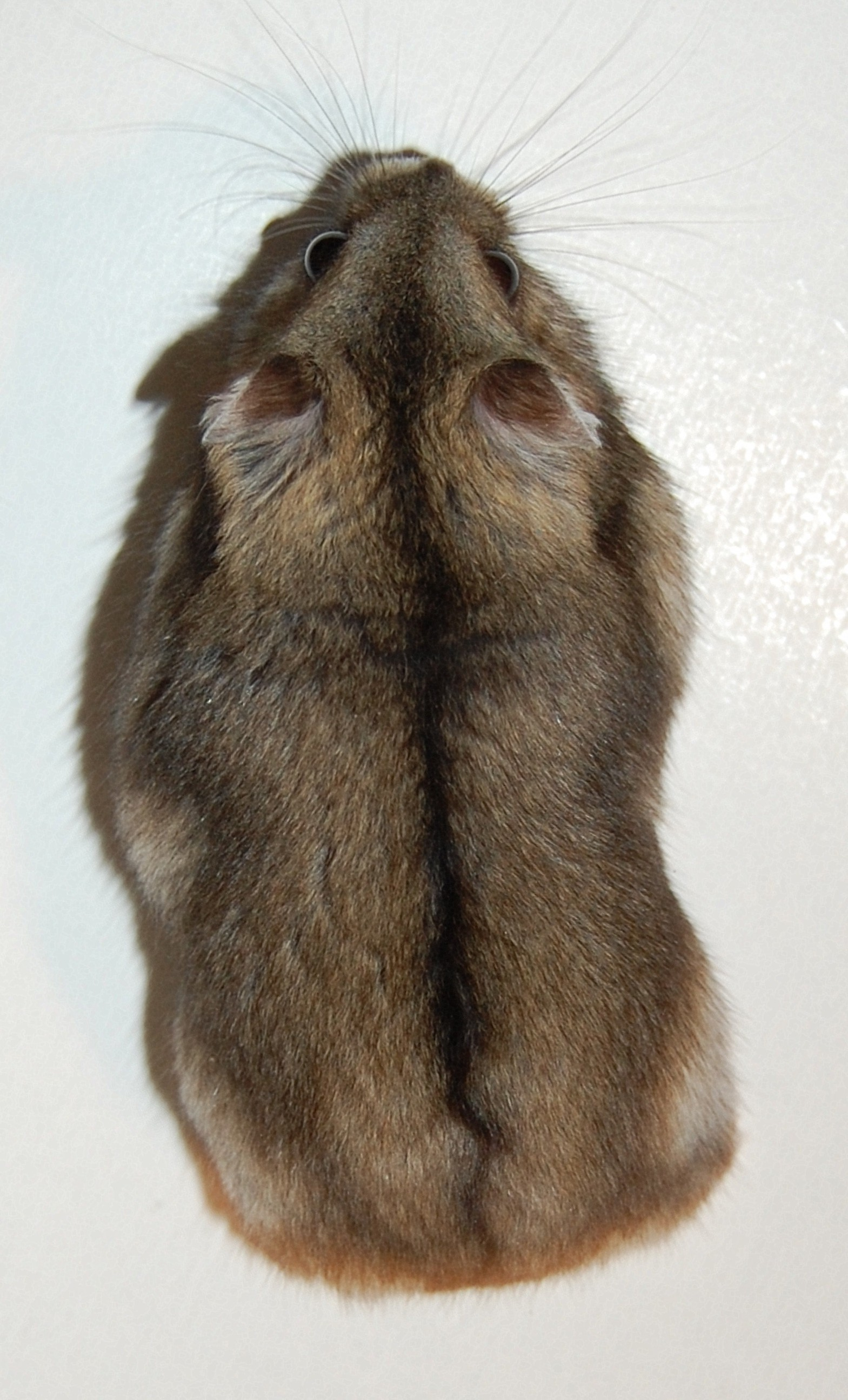 chomik dżungarski Kropka